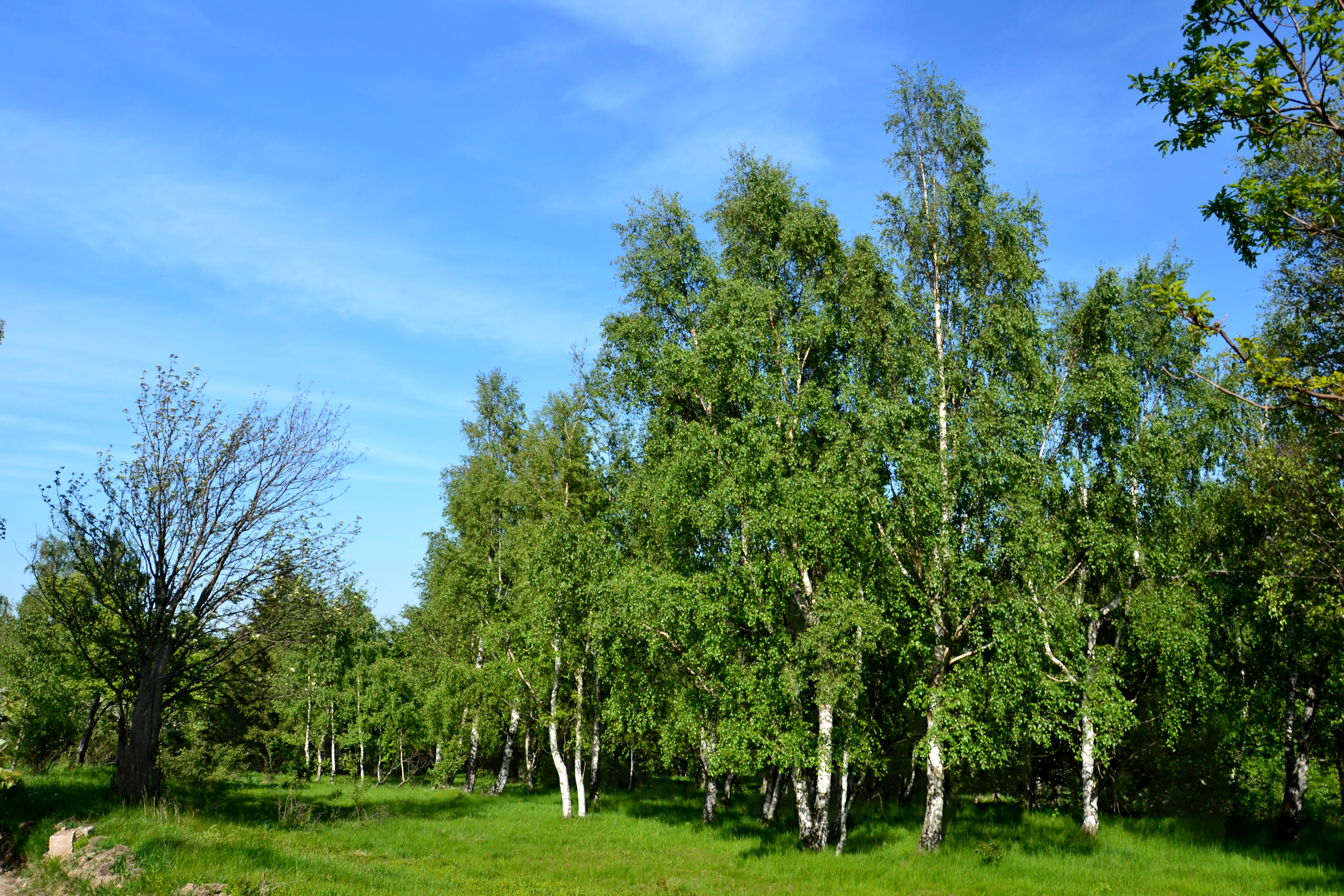 Severní okraj západní části chráněného území